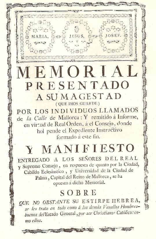 Document d'alegacions jurídiques fet pels xuetes davant la cort de Carles III